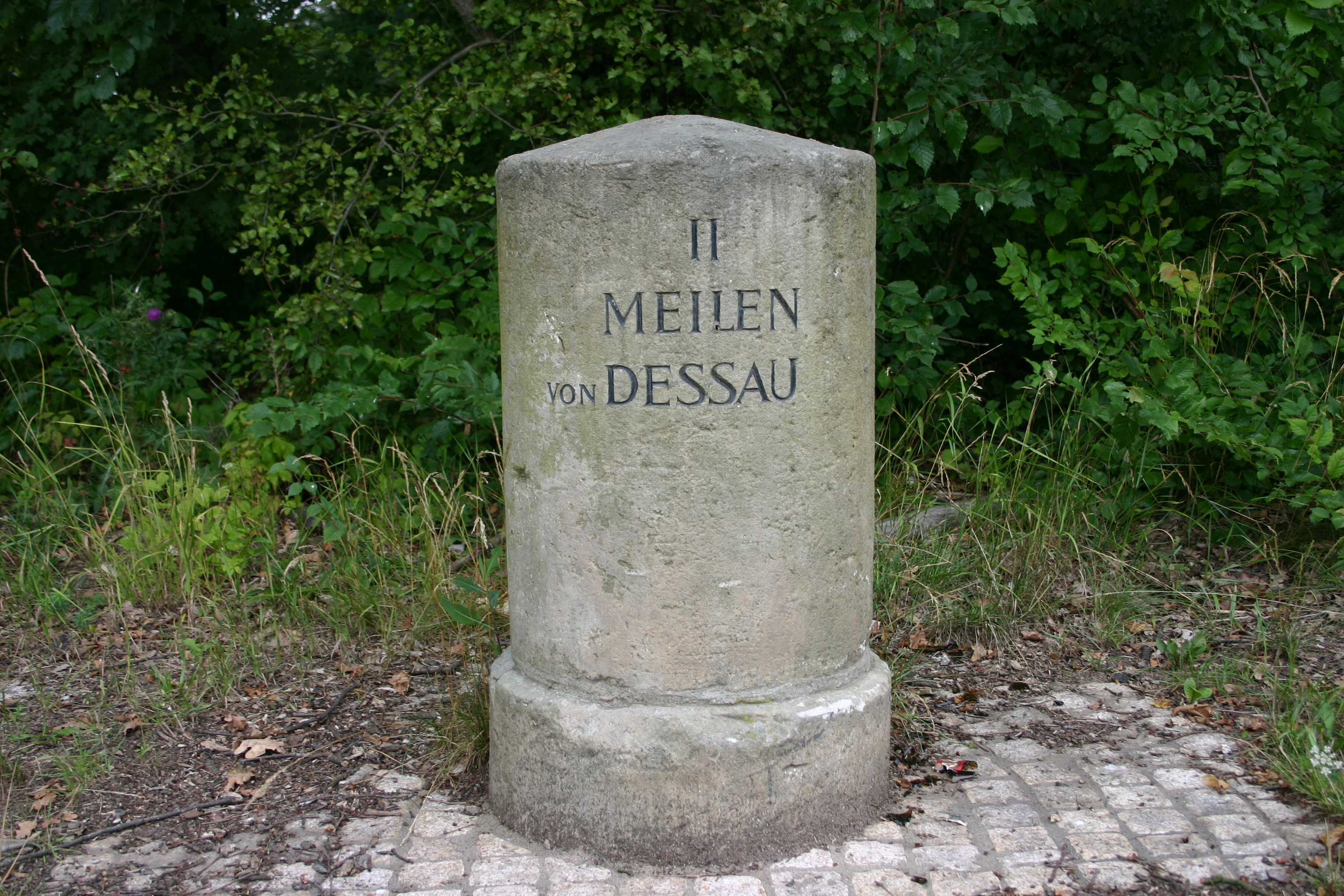 Ein Meilenstein in Anhalt mit der Aufschrift 2 Meilen von Dessau. Der Meilenstein steht an der Landstraße (ehemalige B107) zwischen Wörlitz und Coswig.